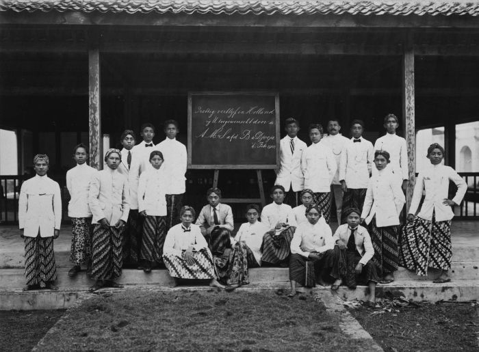 Foto. Portret van de leerlingen van de Algemene Middelbare School, afdeling B, te Yogyakarta, ter gelegenheid van het vertrek van G.A.J. Hazeu terug naar Nederland, 1920